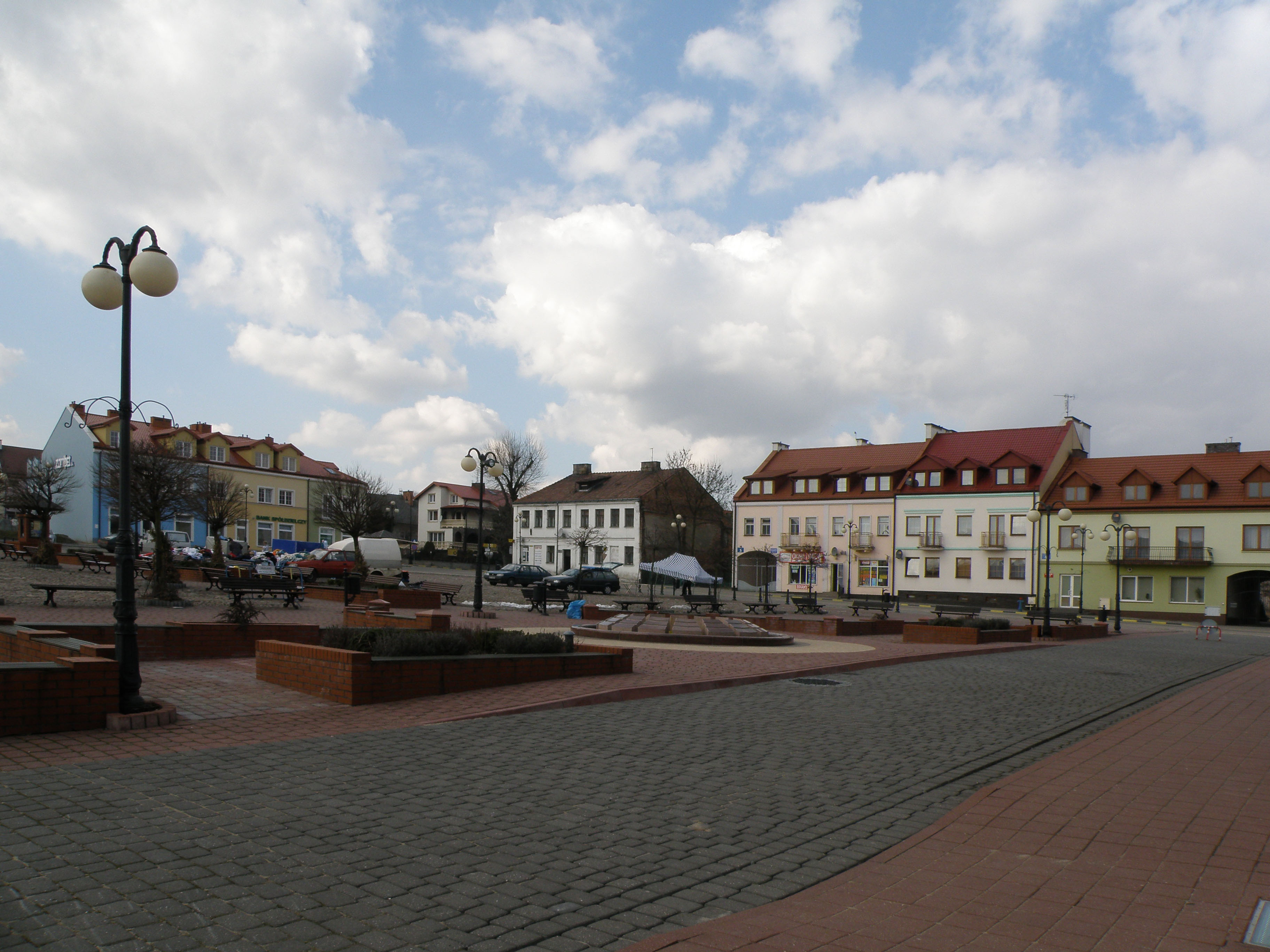 Serock (woj. mazowieckie, powiat legionowski) - Rynek